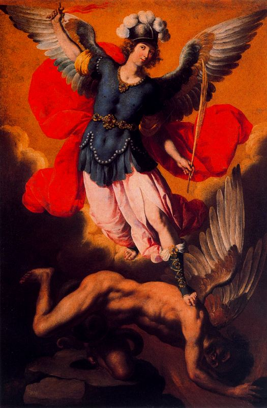 San Miguel Arcángel, Marquand Collection, Metropolitan Museum